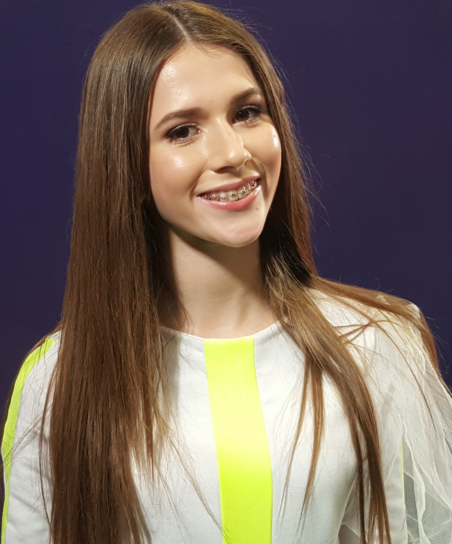 Polska piosenkarka Roksana Węgiel po próbach do występu w 16. Konkursie Piosenki Eurowizji dla Dzieci w Mińsku, 23 listopada 2018.